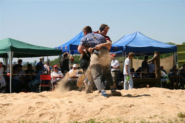 Baldeggschwinget, Pfingsten 2008, Baden AG, Schweiz